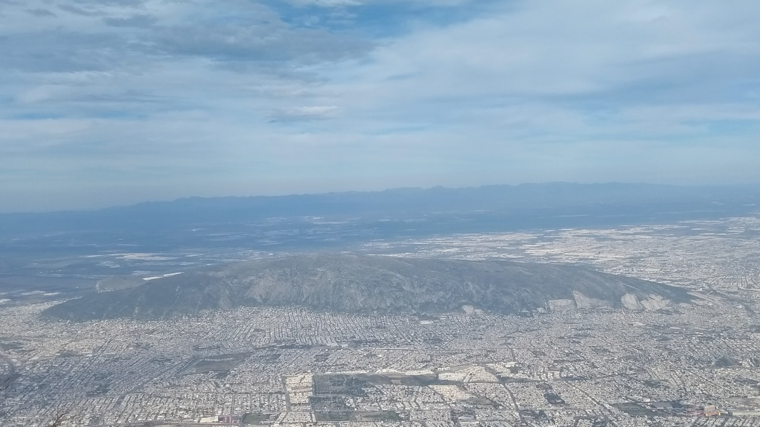 Montaña rodeada de ciudad